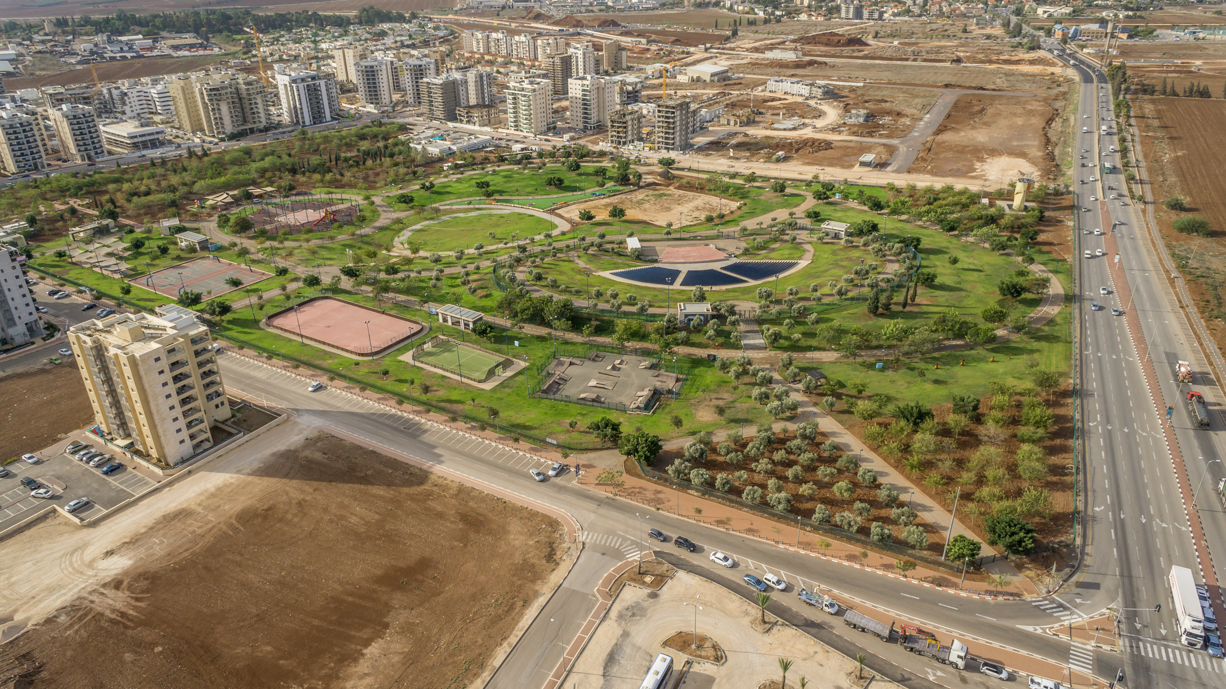 תצלום אויר של פארק העירוני